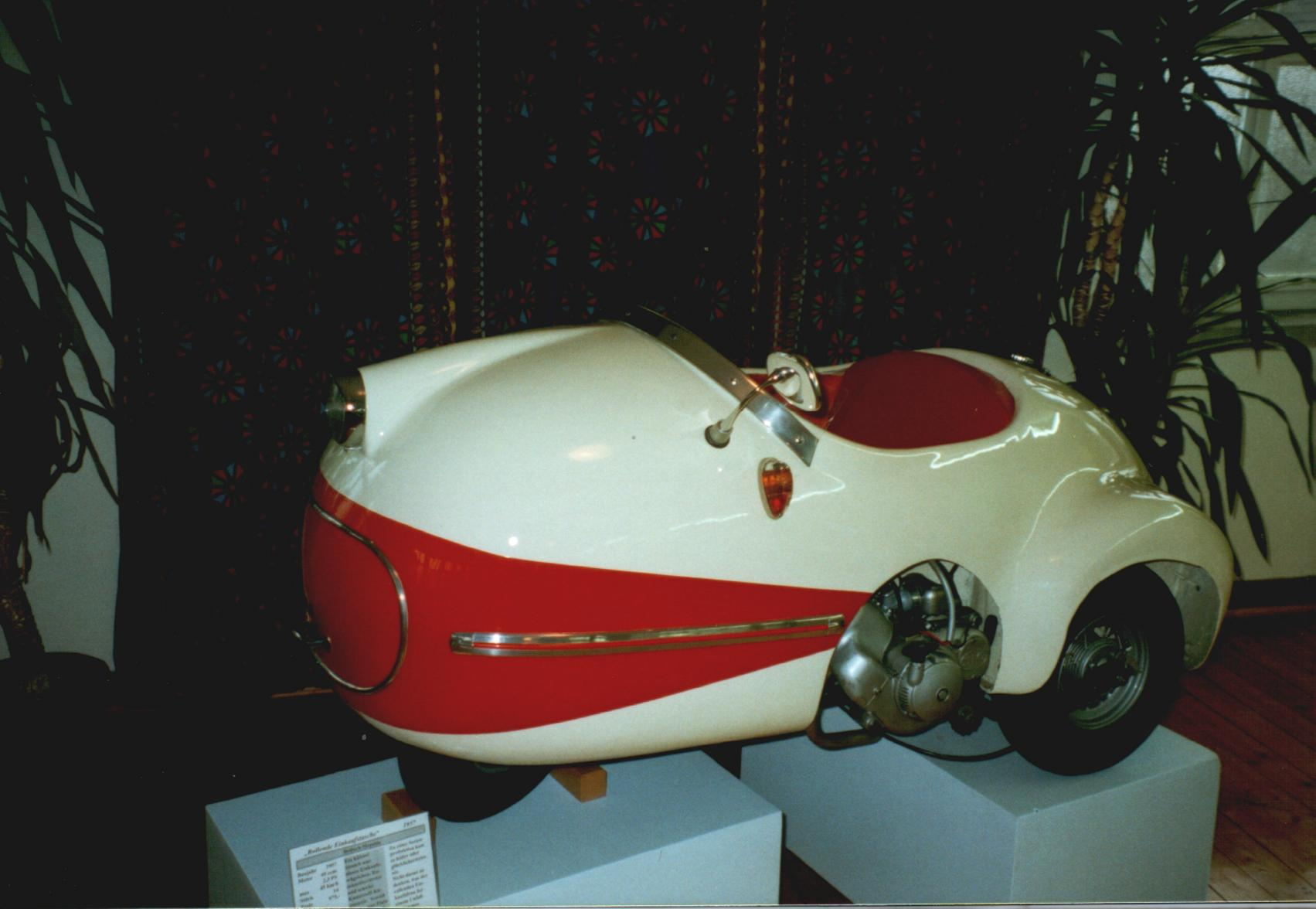 Brütsch Mopetta 1957